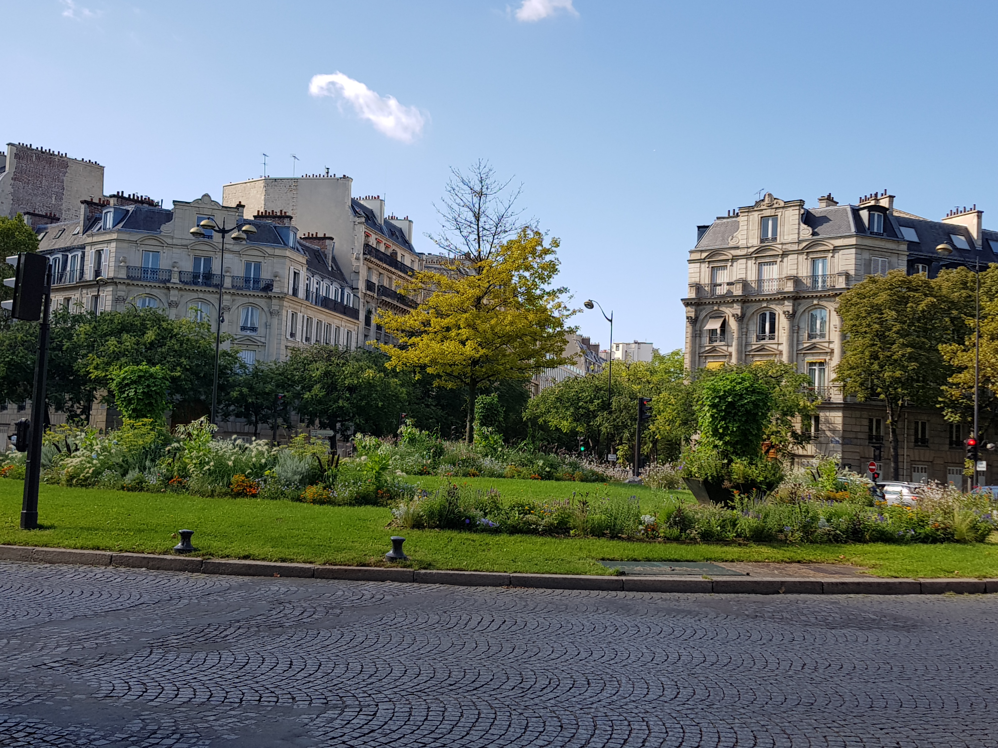 Place de Wagram, Paris 17e.